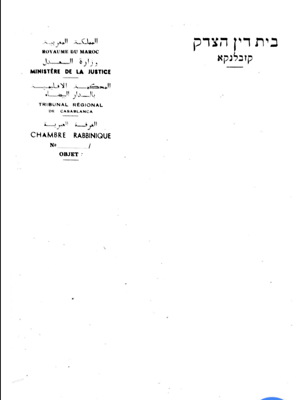 דף בית הדין במרוקו